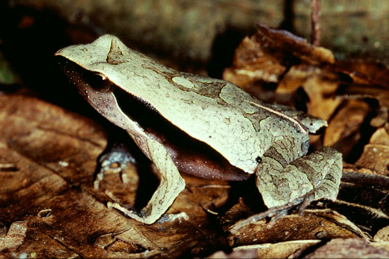 Physalaemus olffersii - Rã-bugio